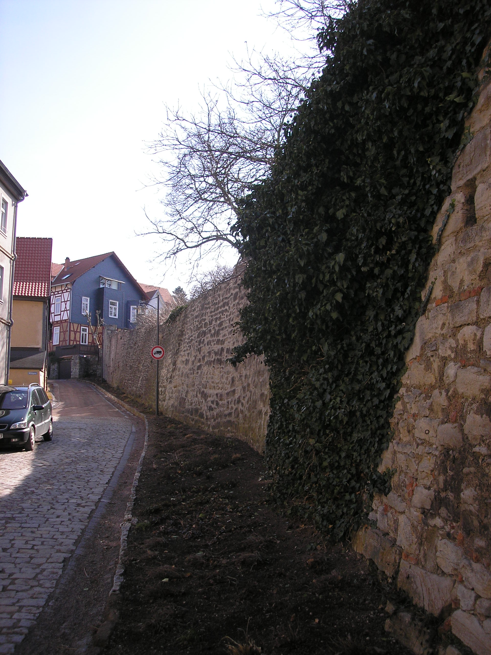 Die Stadtmauer südwestlich der Liebfrauenkirche in Arnstadt (Thüringen).